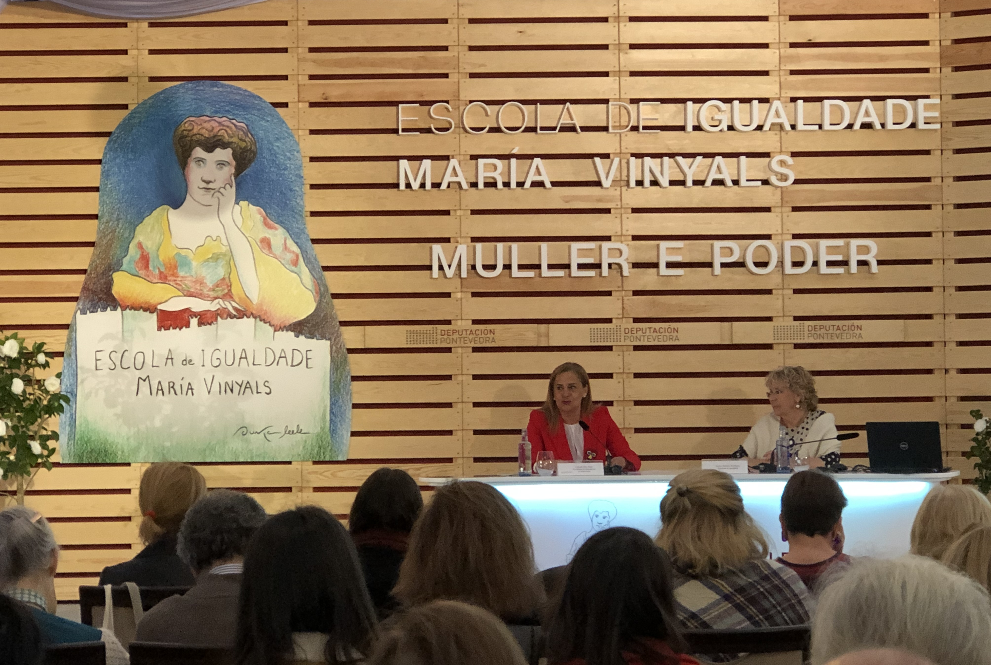 Inauguración de la Escuela de Igualdad María Vinyas Castillo de Sotomayor 2019